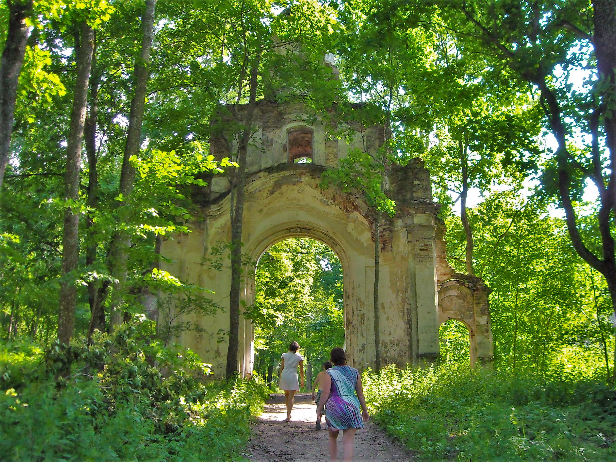 Беларуская (тарашкевіца): Фрагмэнты парку і брамы. в. Сітцы This is a photo of Belarusian heritage monument. Reference number: 212Г000448 ( WLM)